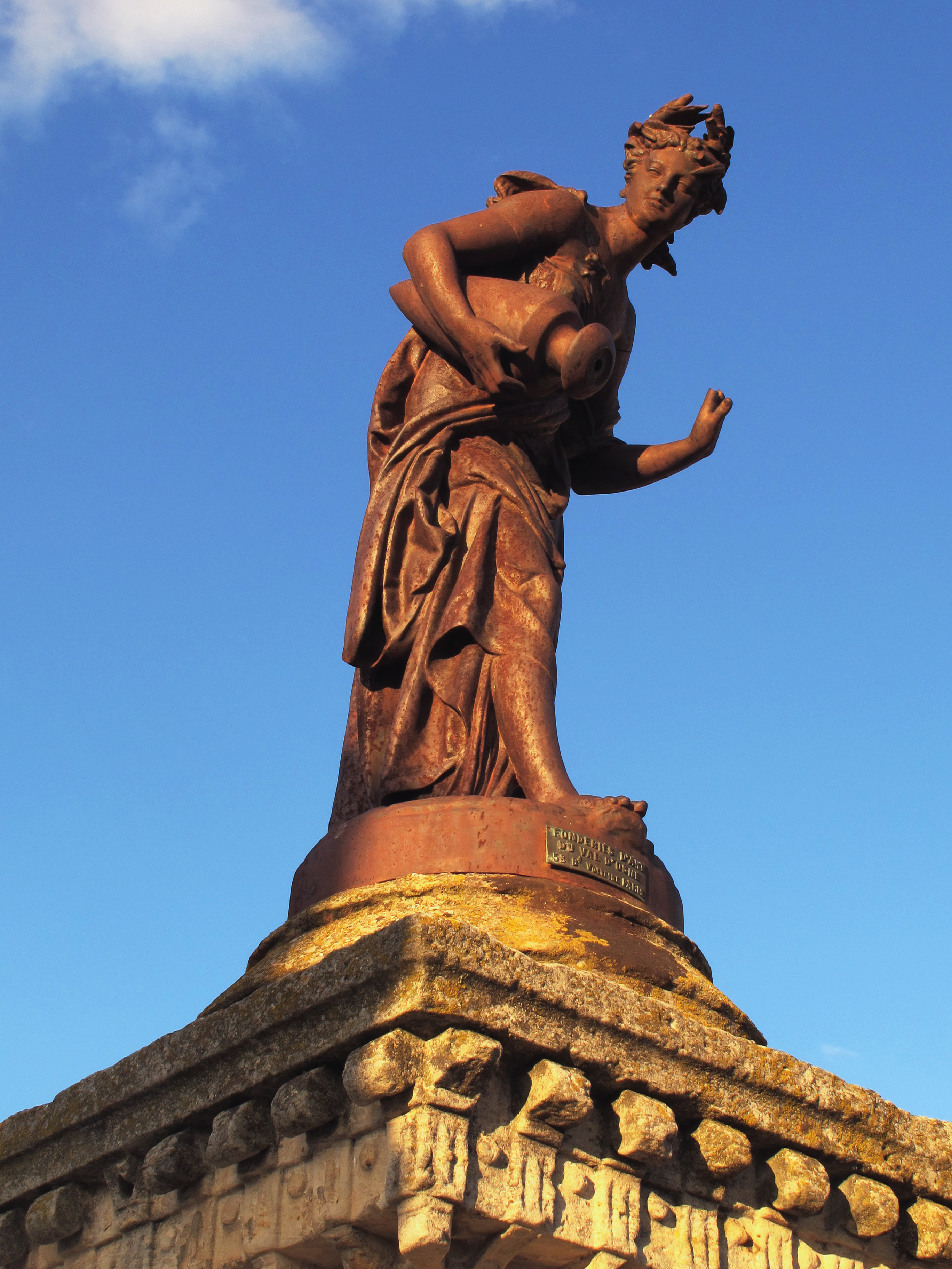 Cevico de la Torre, provincia de Palencia, Castilla y León, España.